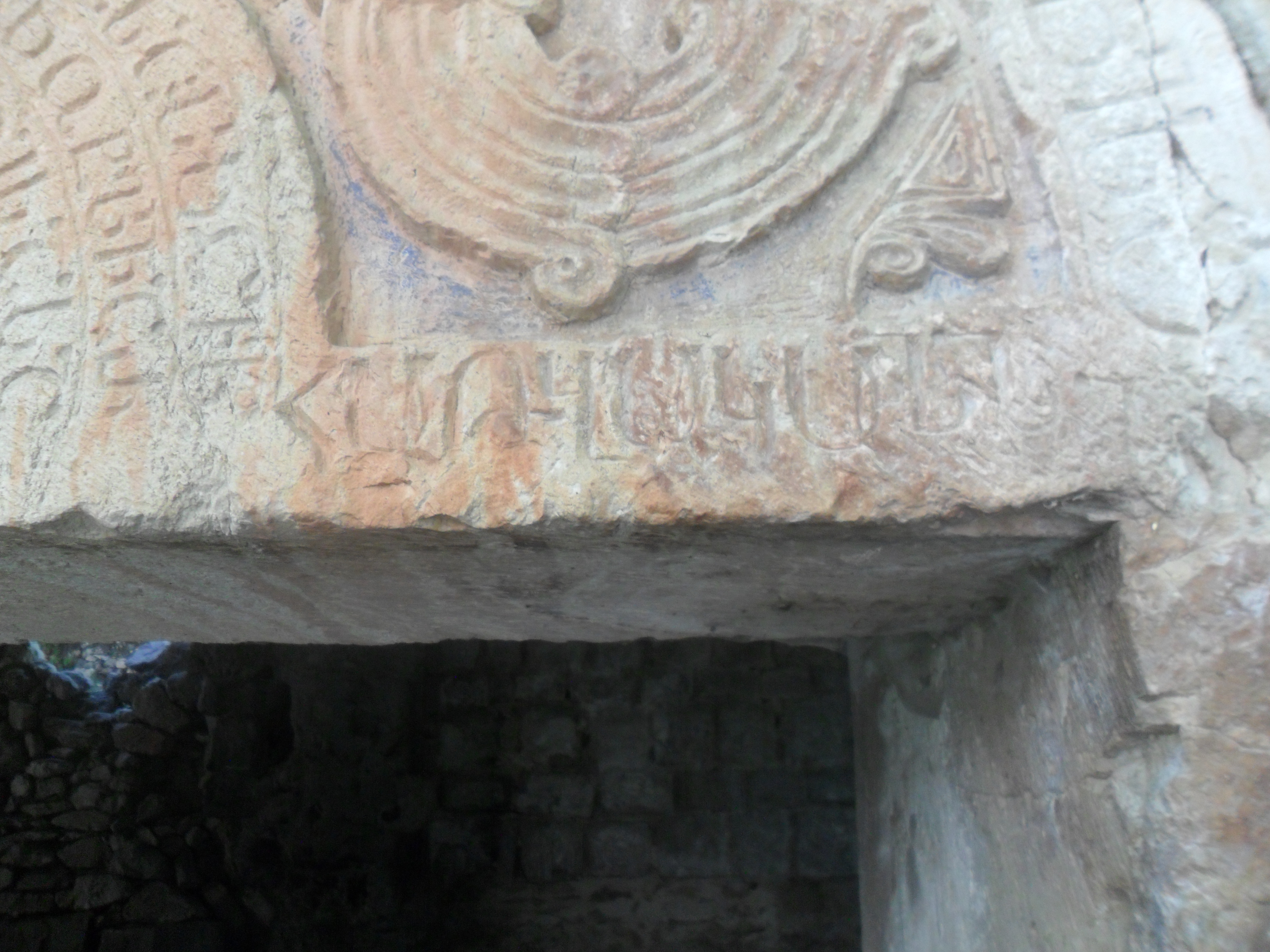 Իշխանի եկեղեցու արձանագրության հայատառ թվագրում